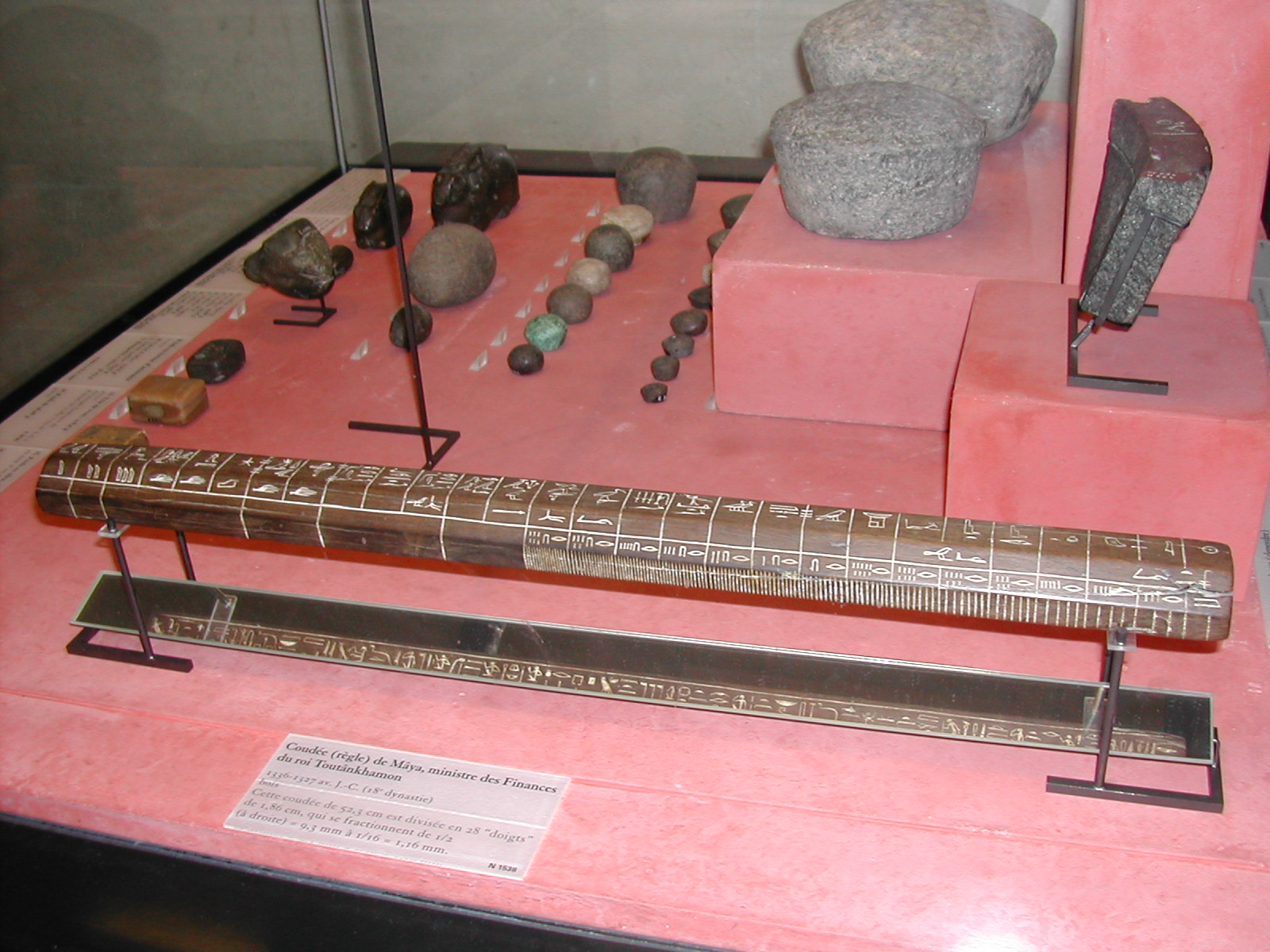 Coudée de Maya, époque de Toutankhamon, ca. 1330 av. J.-C. ; au second plan poids égyptiens.